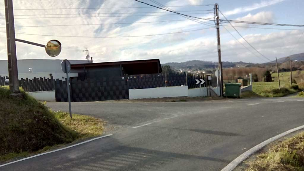 Vista do Campo das Ratas, Castro, Narón.